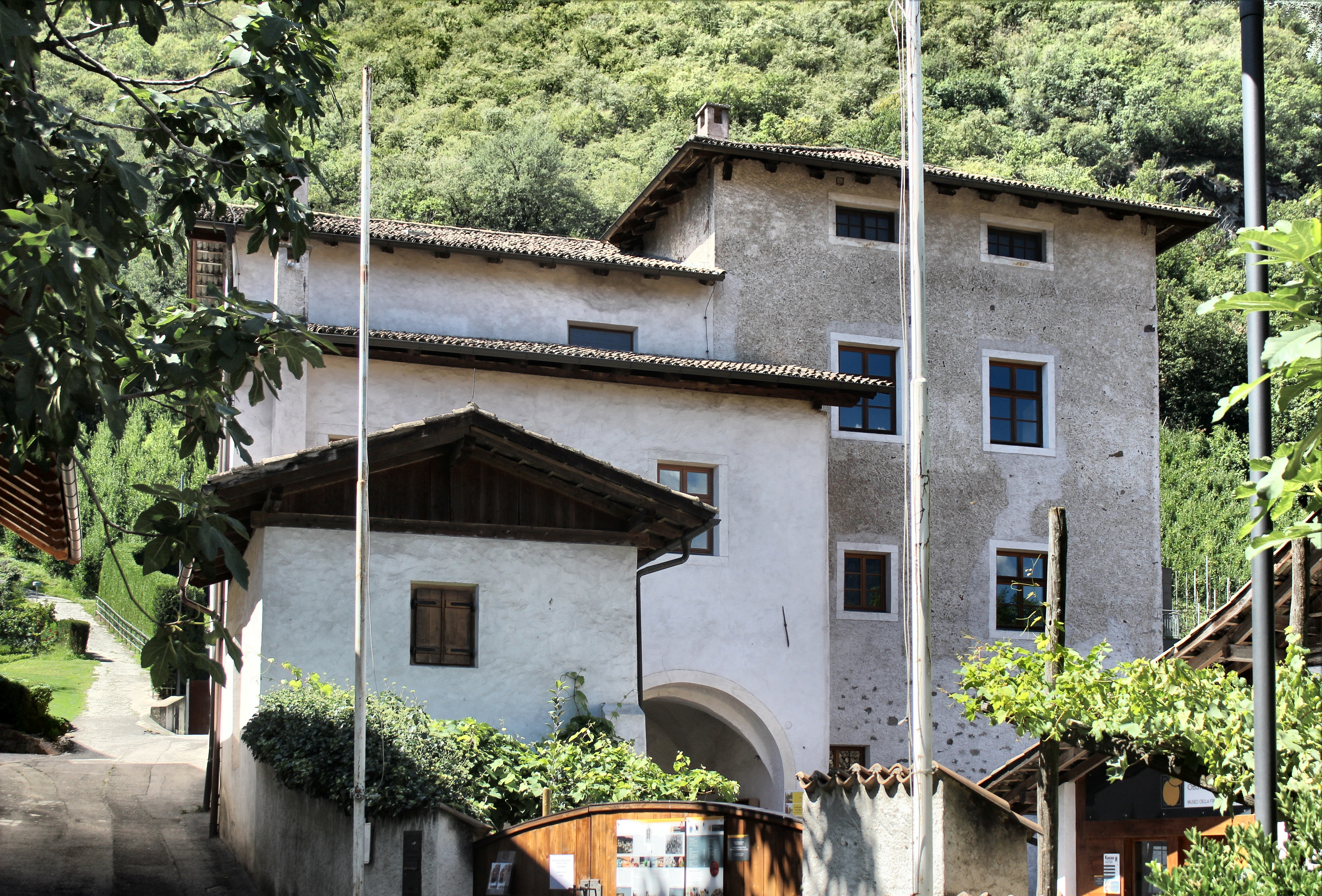 Larchgut, Brandiswaalweg 4 in Lana